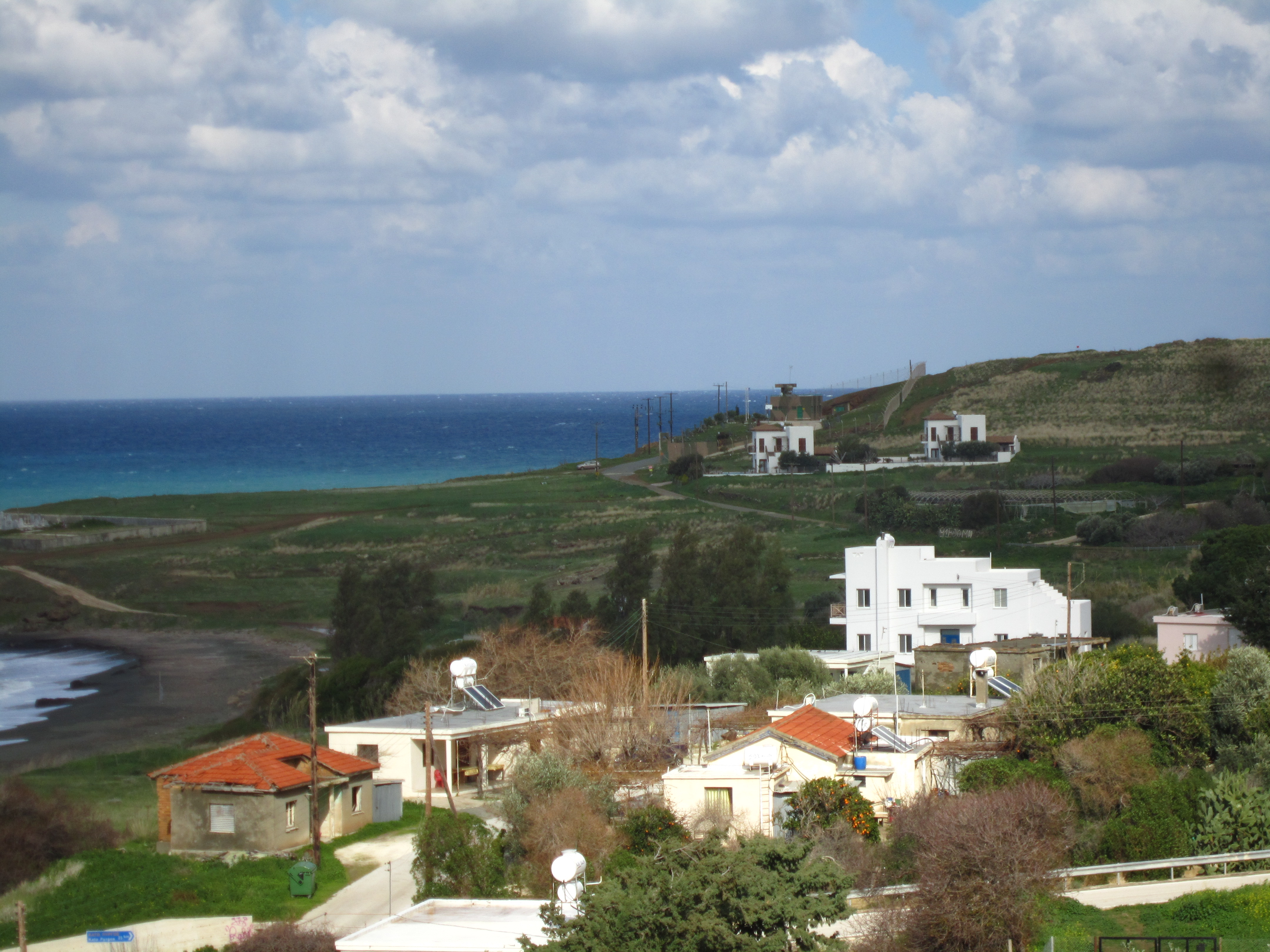 Ingang kokkina zuid